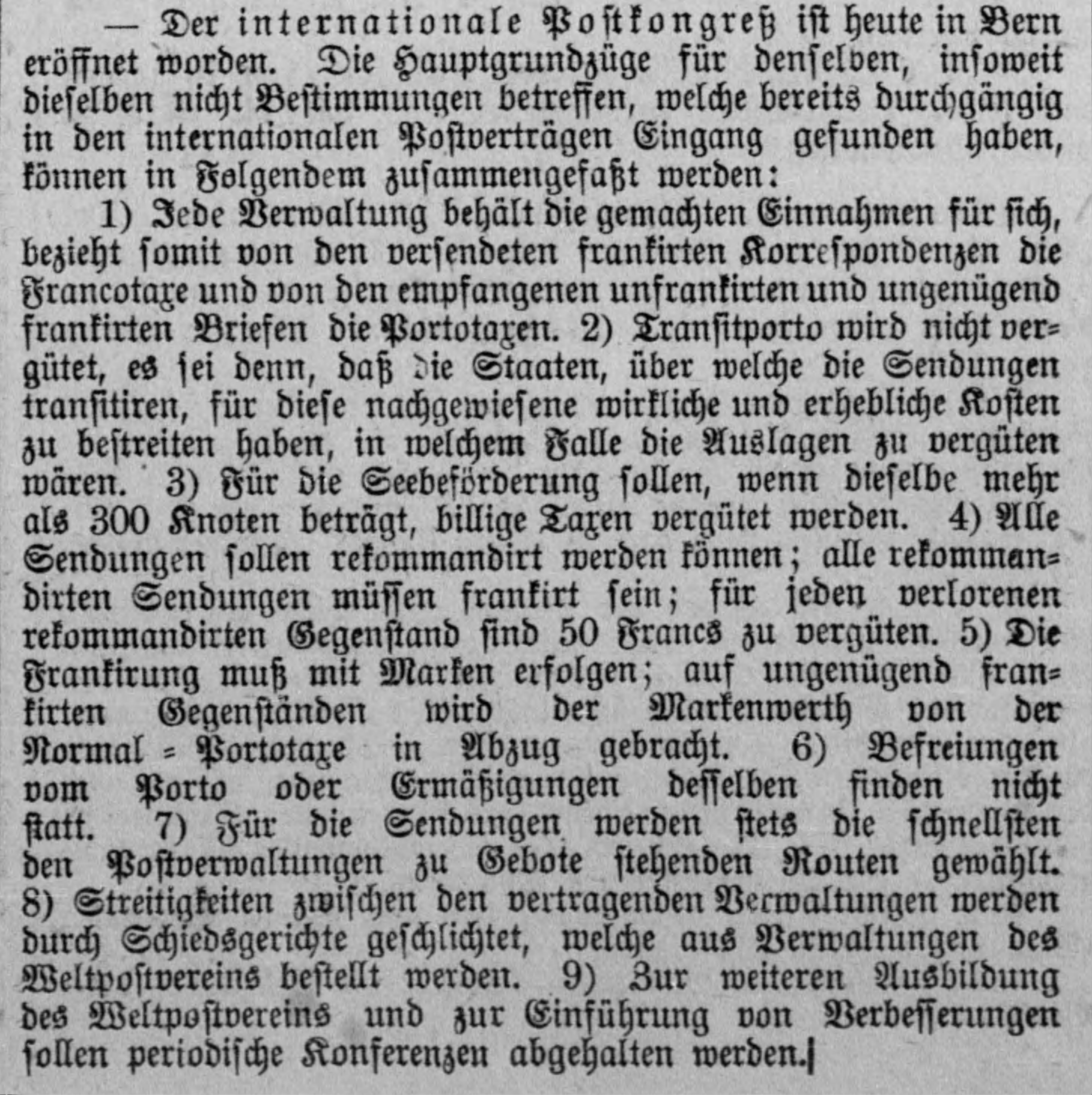 Zeitungsartikel des Deutschen Reichsanzeigers zum Gründungskongress des Weltpostvereins 1874 in Bern